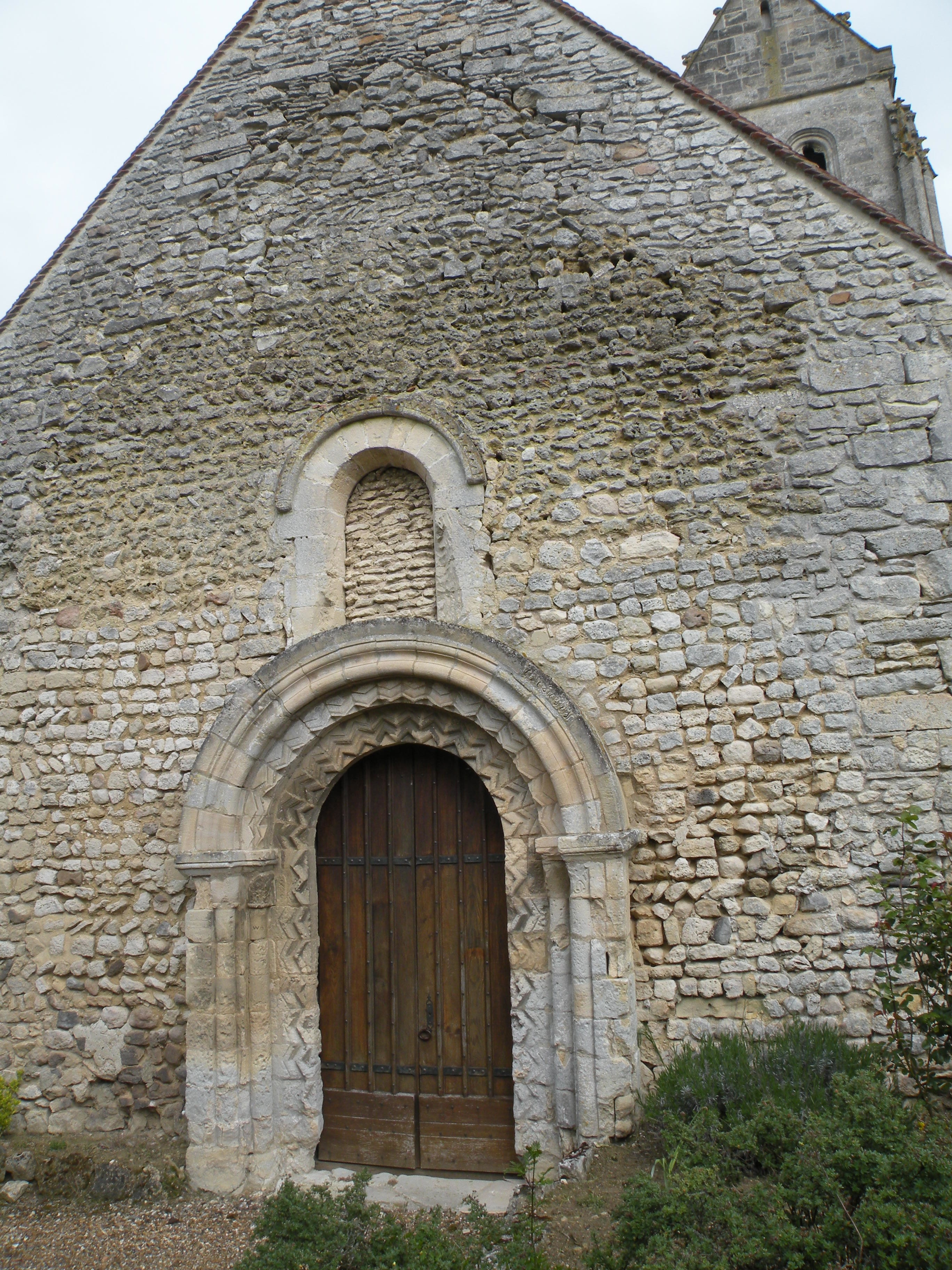 Église Saint-Martin de Marquemont